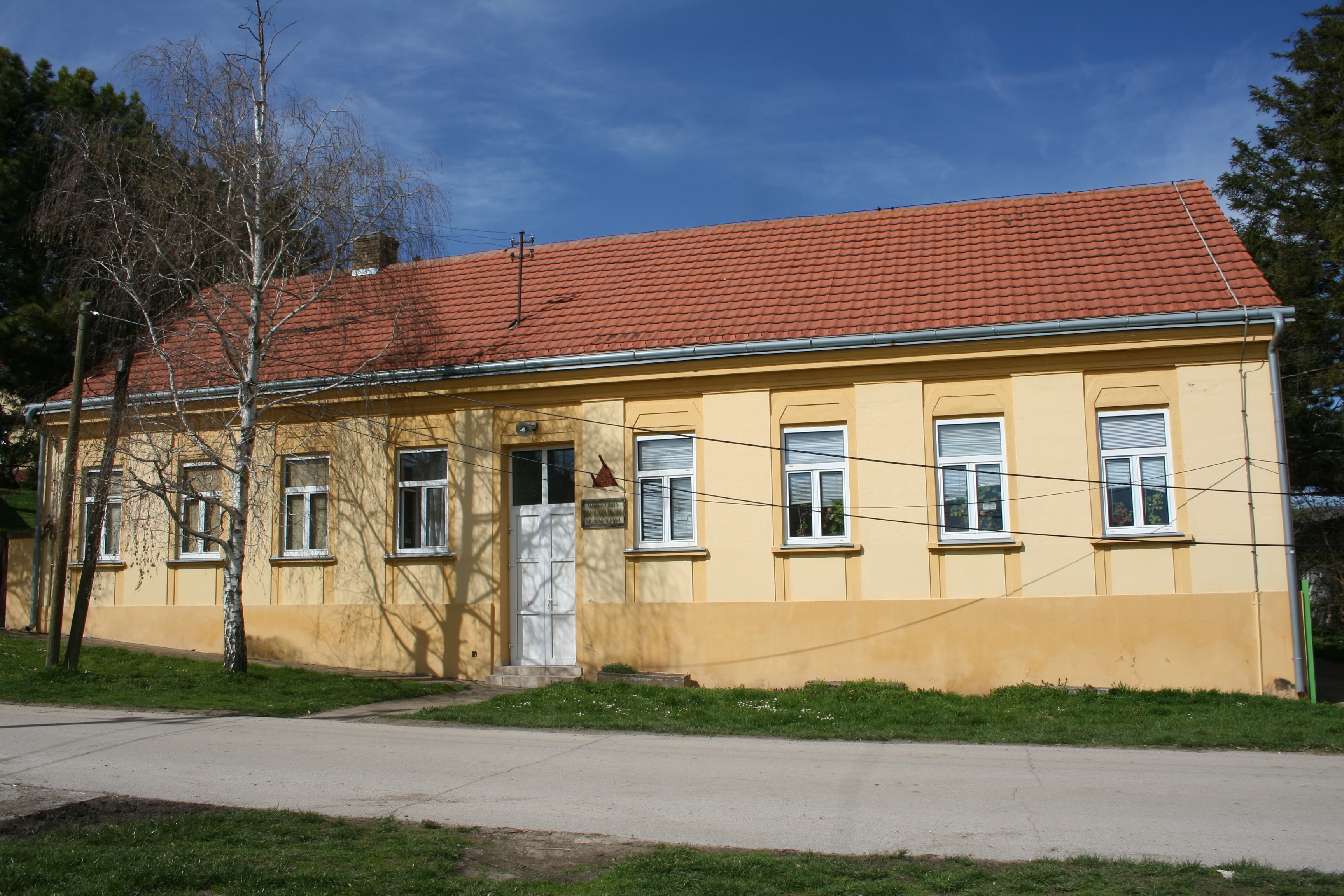 Šuljam, škola